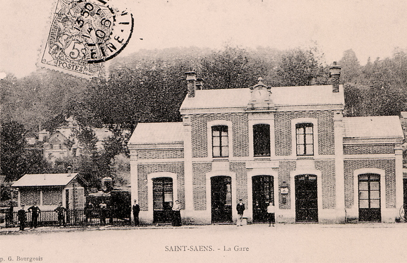 La gare de Saint-Saëns sur la ligne en provenance de Montérolier-Buchy